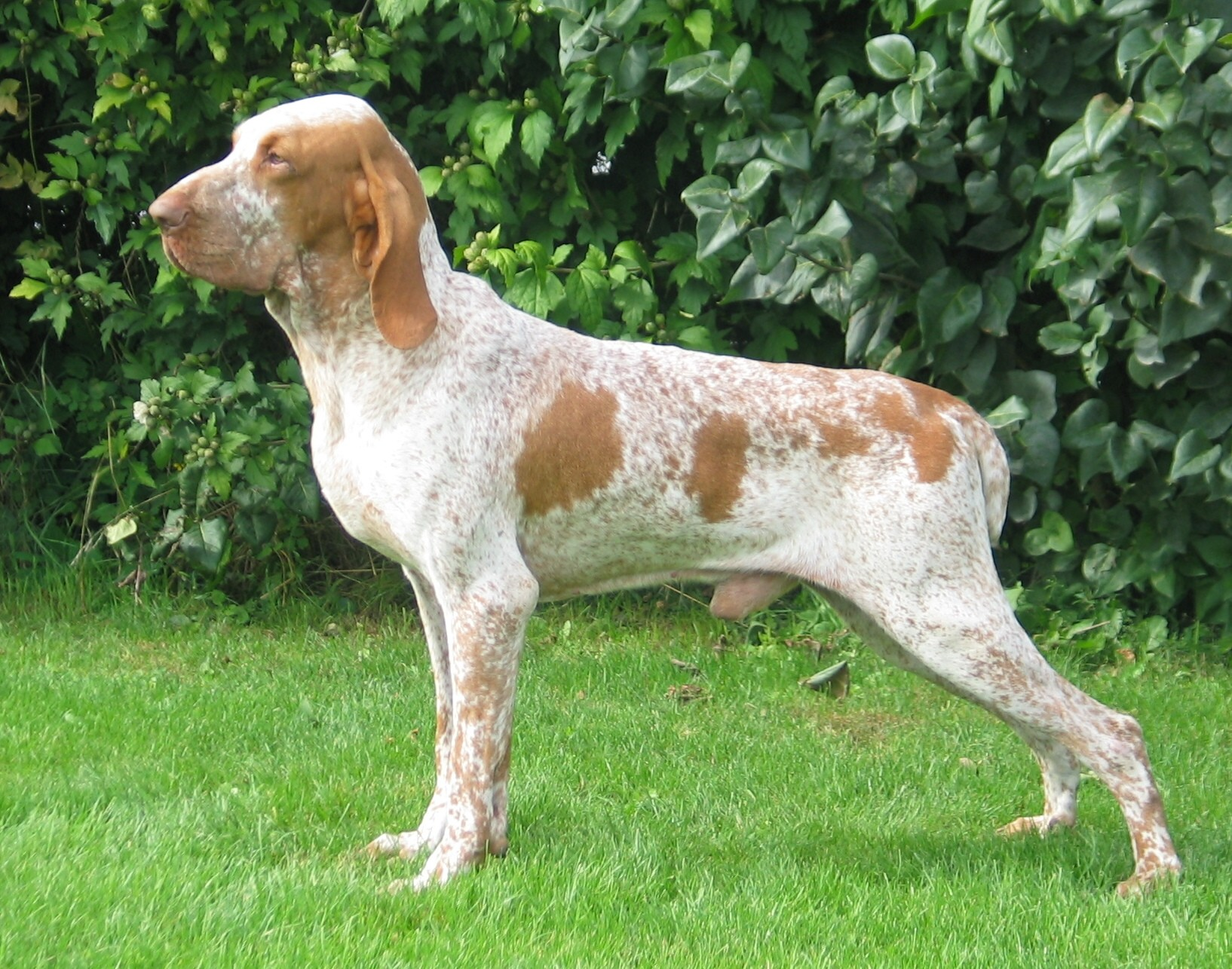 Bracco Italiano Giotto (Omar x Ronda delle Cascate)